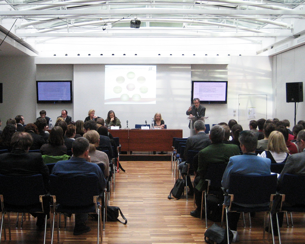 Veranstaltung im Treffpunkt Europa, Haus der Europäischen Union Wien